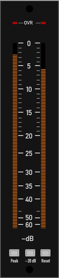 Peak Programme Meter, Digital Scale (IEC 268-18)